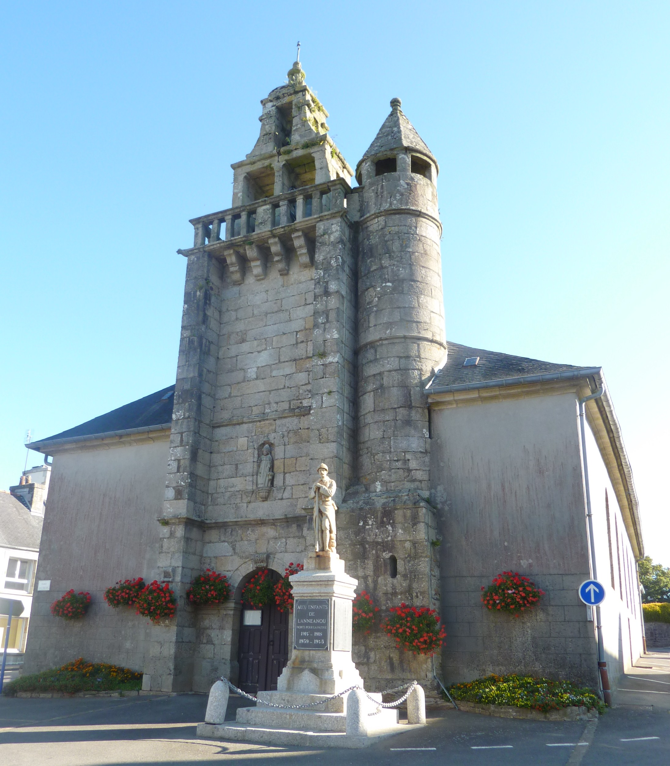 Lannéanou : l'église paroissiale